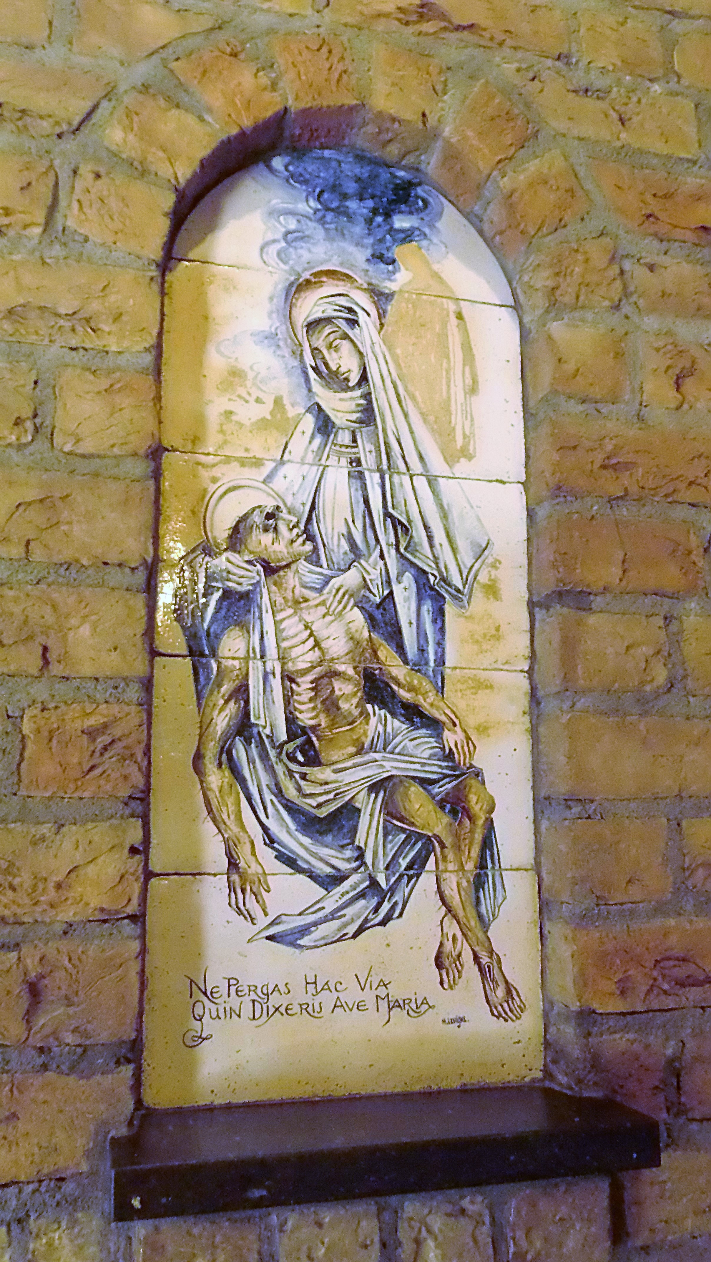 Tegeltableaux in Klooster Dolphia